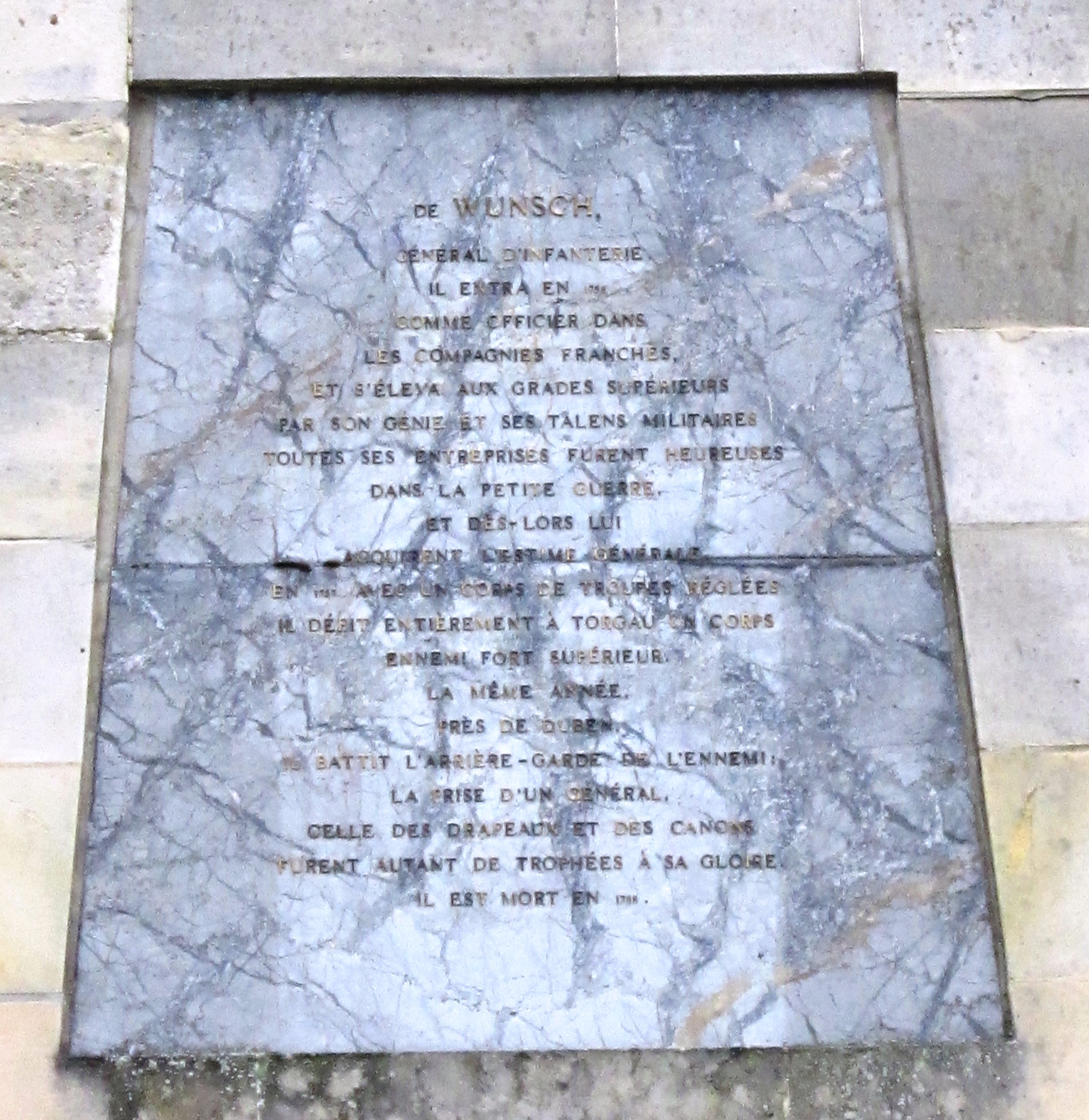 Ehrentafel für Johann Jakob von Wunsch (1717-1788) am Obelisken in Rheinsberg